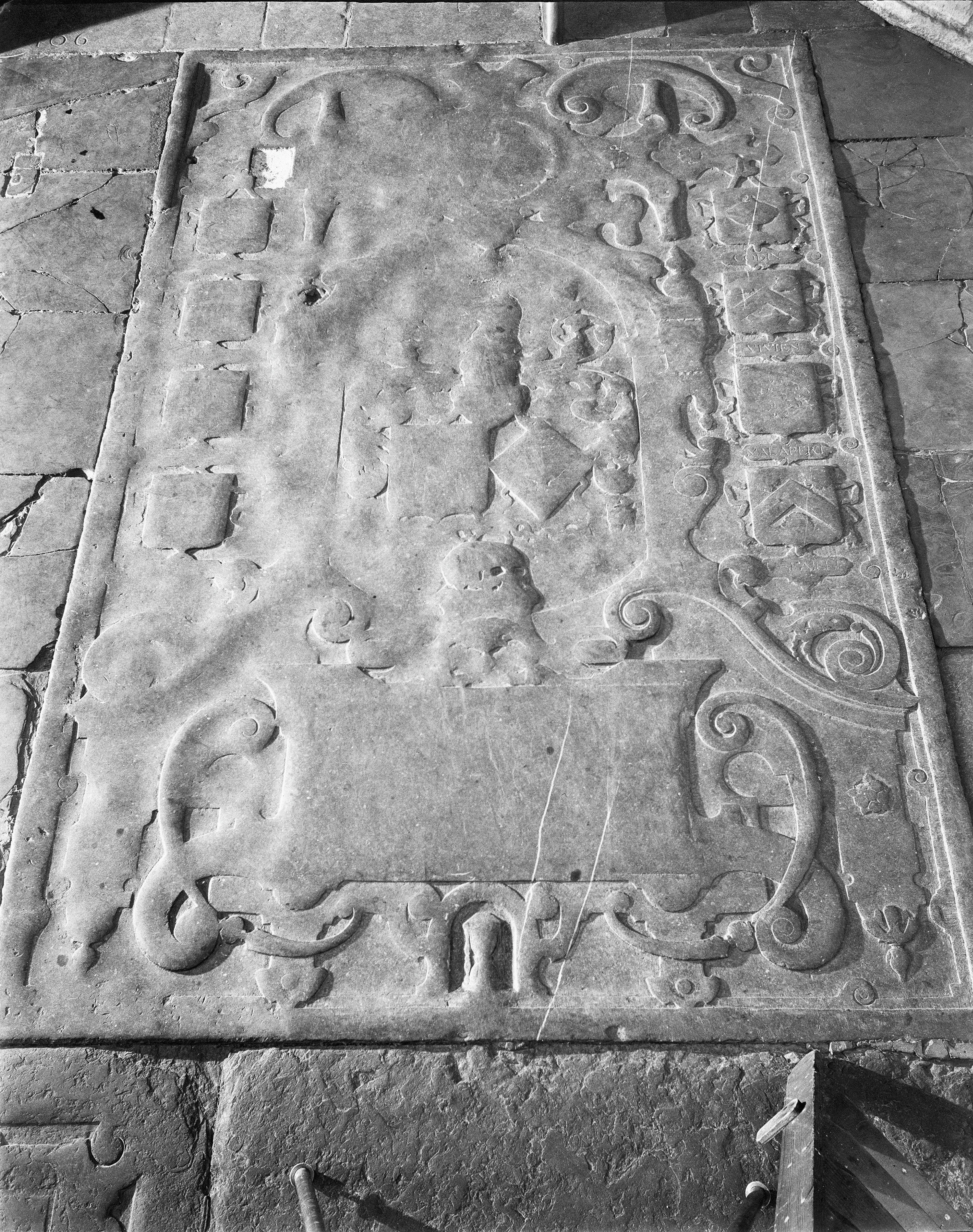 Domtoren En Kerk, Tekeningen: Kapel van Arkel